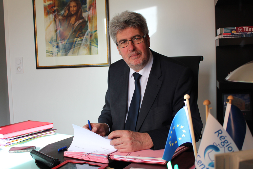 Jean-Marie Beffara, né le 13 octobre 1962 à Châteauroux (Indre), est un homme politique français. Il est député de la 3ème circonscription de l’Indre et Loire, membre du Groupe Socialiste, Radical, Citoyen, membre de la commission des finances, et 1er vice-président du conseil régional du Centre en charge des finances, des grandes contractualisations, des moyens généraux et du personnel.